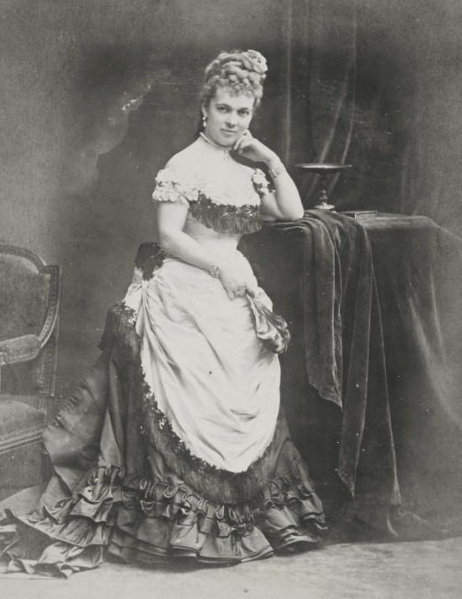 Княгиня Трубецкая, Елизавета Эсперовна (1832—1907)